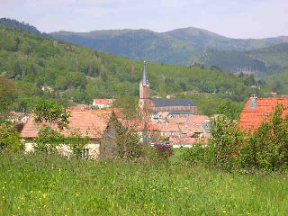 Vue de Giromagny en regardant vers le Ballon d'Alsace Photo prise le 14 mai par LP90